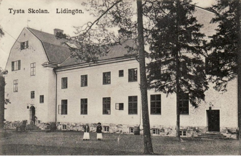 Tysta skolan, Floravägen 24 Lidingö 1914. Arkitekt Alf Landén